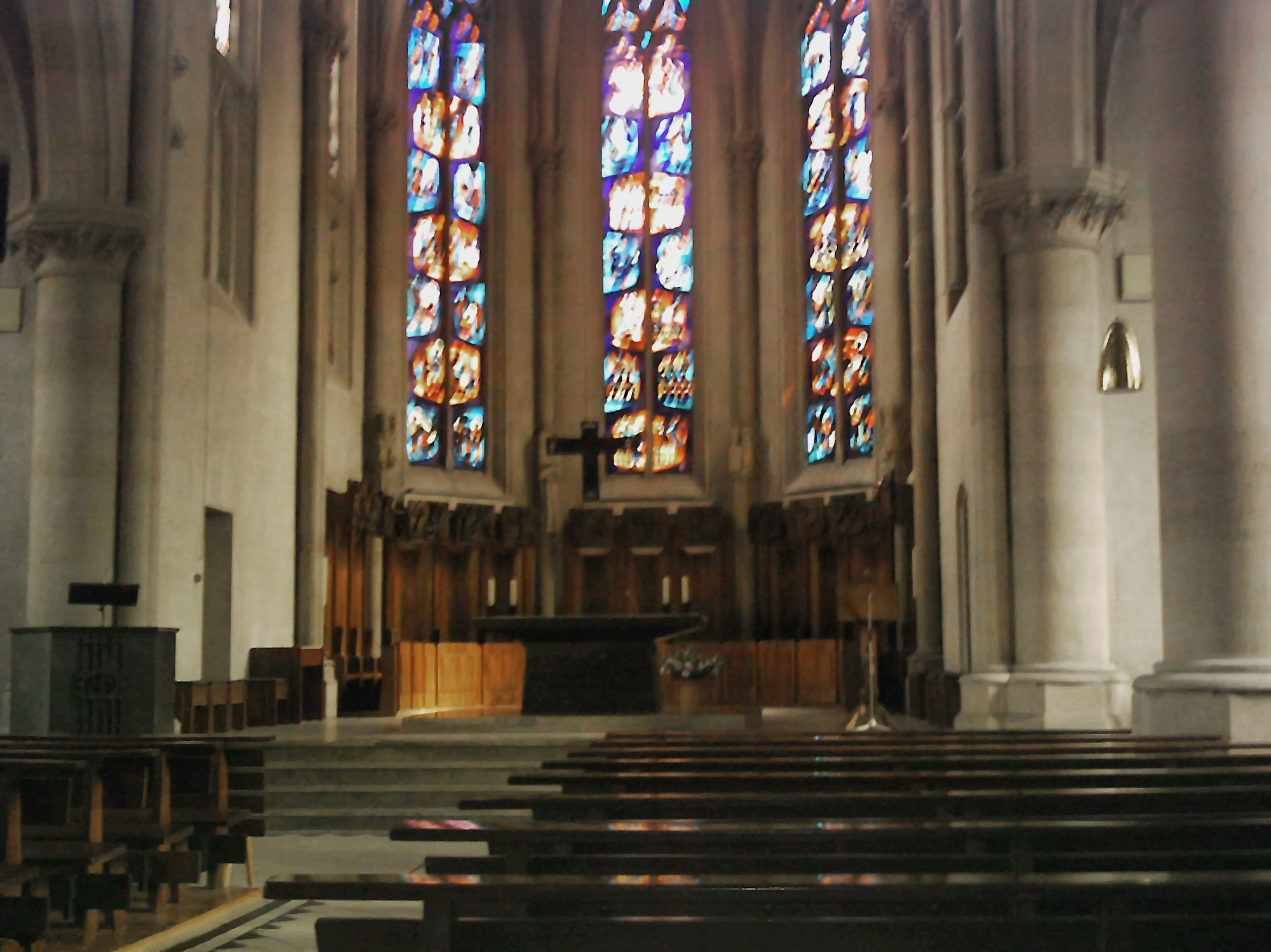 Innenansicht St. Johannes Evangelist: Die römisch-katholische St. Johannes Kirche ist die römisch-katholische Stadtpfarrkirche in Tübingen (Baden-Württemberg). Die Durchführung des Baues von 1875 bis 1878 erfolgte durch den königlich-württembergischen Hofbaumeister Josef von Egle im Stile der Neugotik. Die Kirche erinnert an die Architektur der Bettelordenskirchen des Mittelmeerraumes und wurde von Bischof Karl Joseph von Hefele am 28. Nov. 1878 eingeweiht. Die Chorfesntster wurden in den 1960er Jahren von Wilhelm Geyer gestaltet.